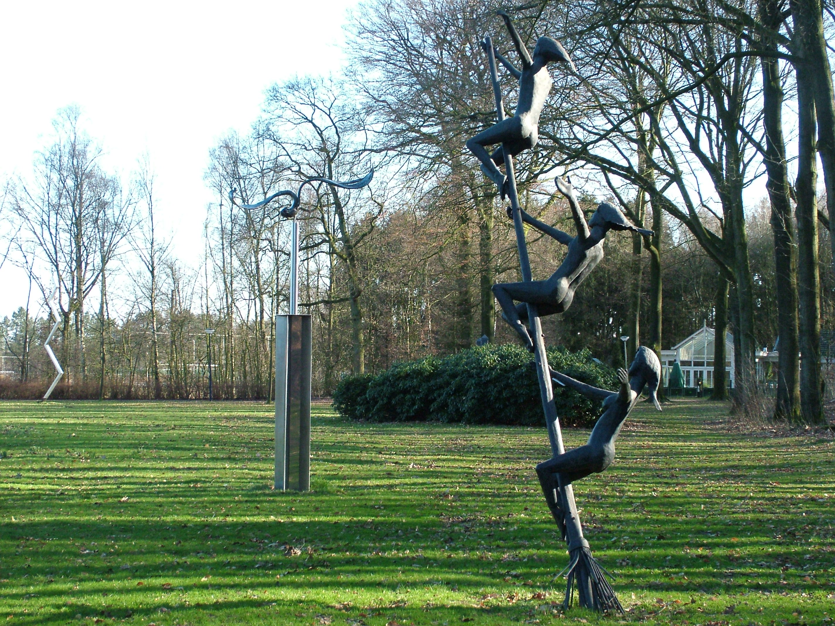 Zeitliche Skulpturenroute "Oerkracht", hier an der Grenze von Silvolde und Terborg